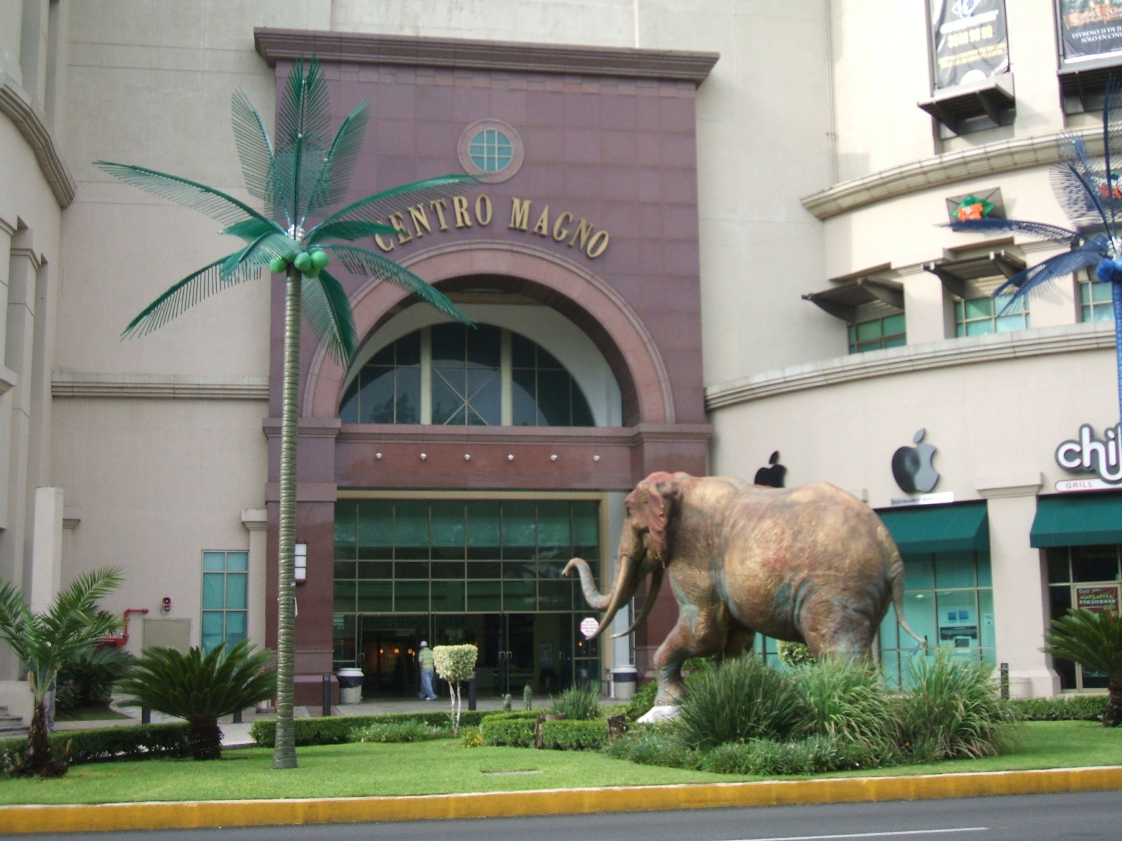 Fotografia de la entrada del Centro Magno en Guadalajara, México.